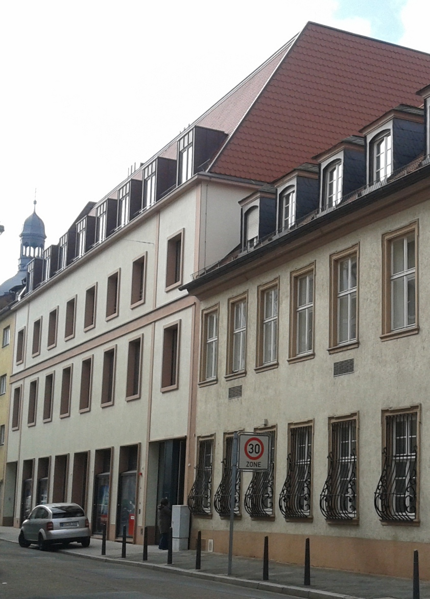 Das Museum Bassermannhaus in Mannheim, rechts daneben das ehemalige Palais Cunzmann, beide werden genutzt von den Reiss-Engelhorn-Museen